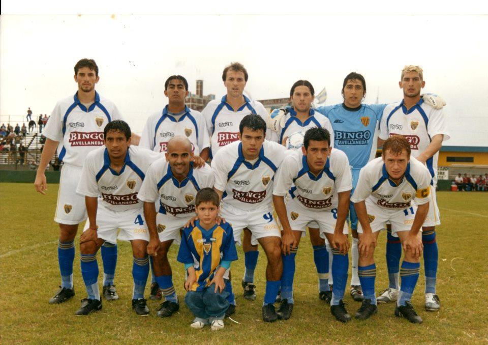 Dock Sud (2005)